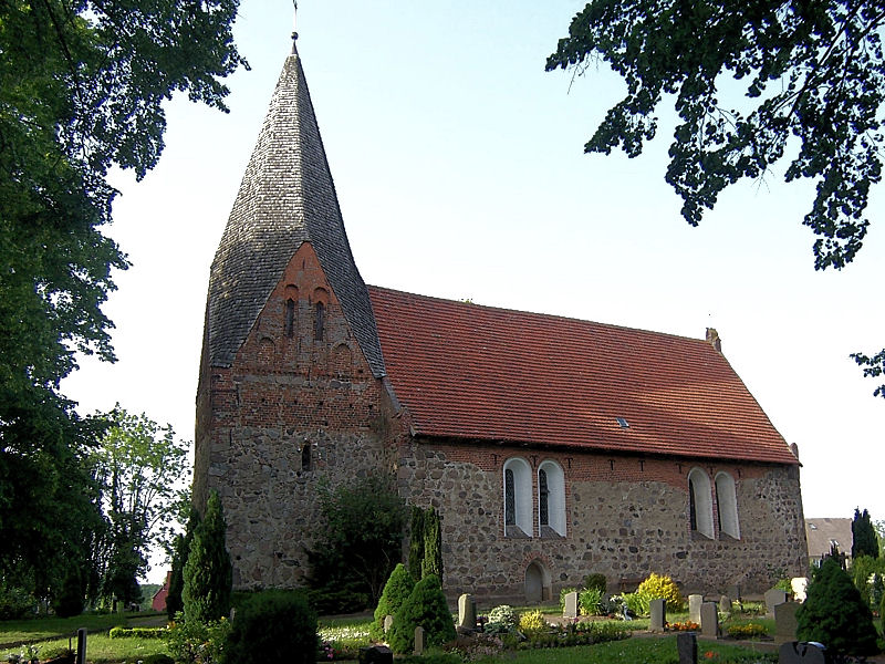 Kirche in Witzin, Landkreis Parchim